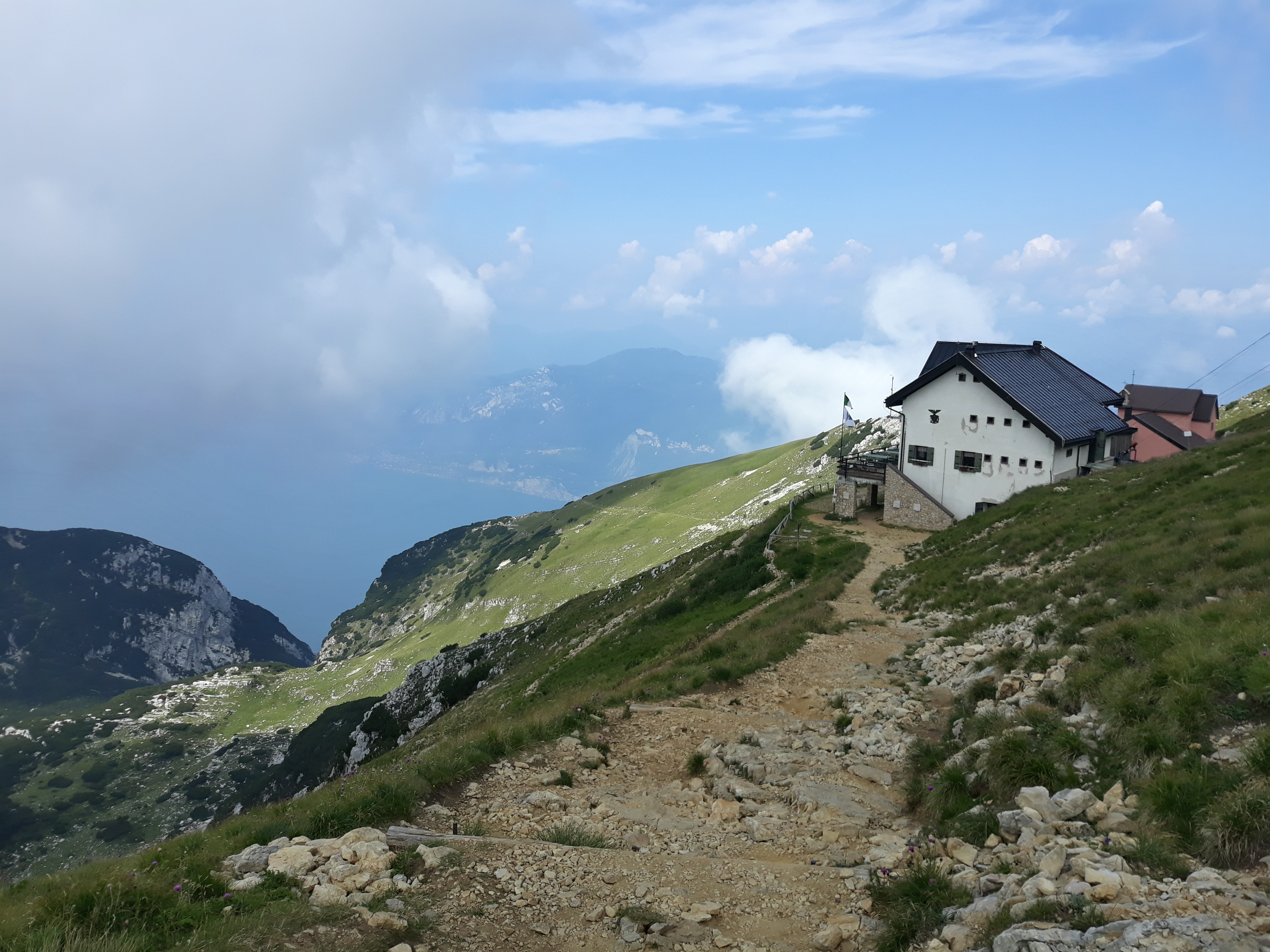 Rifugio al Telgrafo sul Monte Baldo